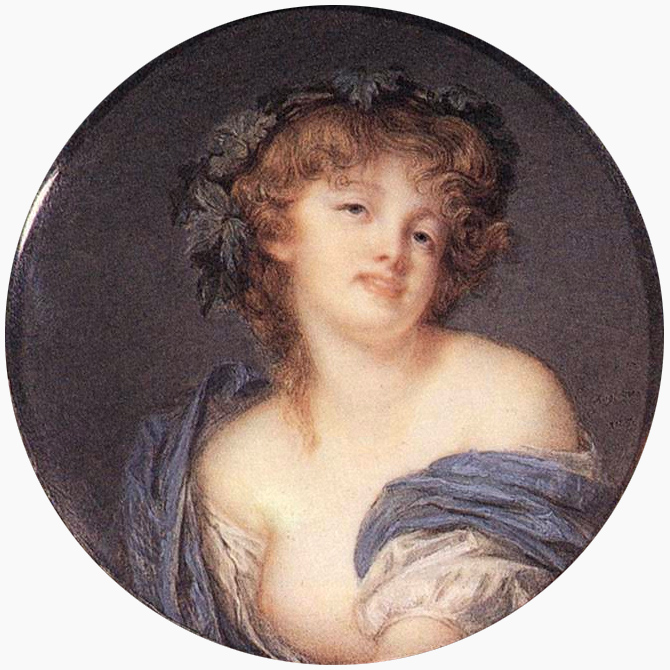 miniature